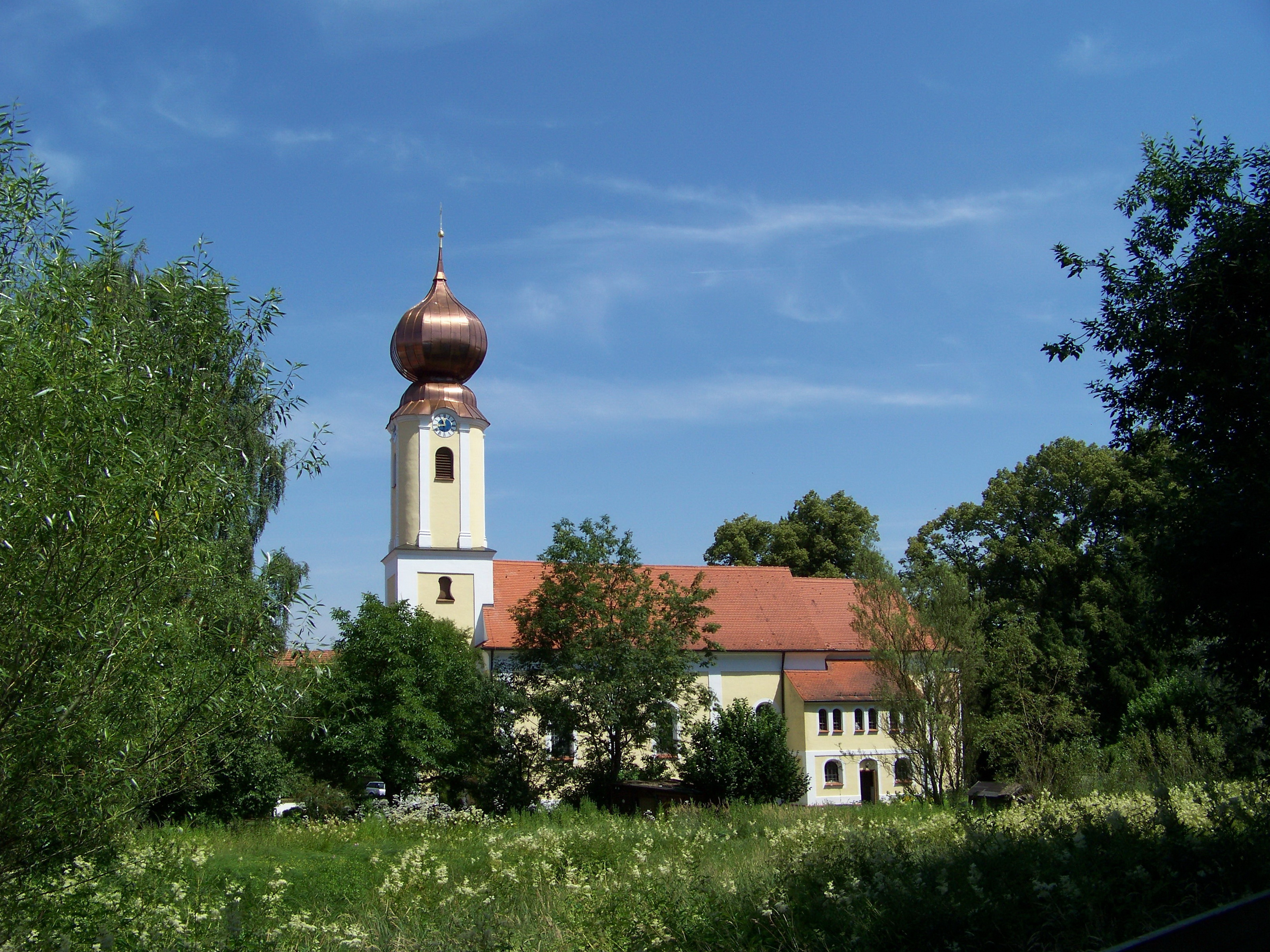 Unterneuhausen, Kirchweg 9. Kath. Pfarrkirche St. Laurentius, barocke Anlage von 1741; mit Ausstattung.